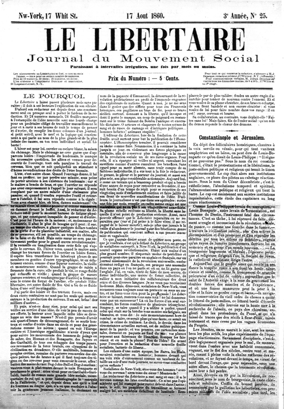 Le Libertaire, Journal du mouvement social, (Joseph Déjacque), New-York, n° 25, 17 août 1860. (Texte sur dejacque.free).)